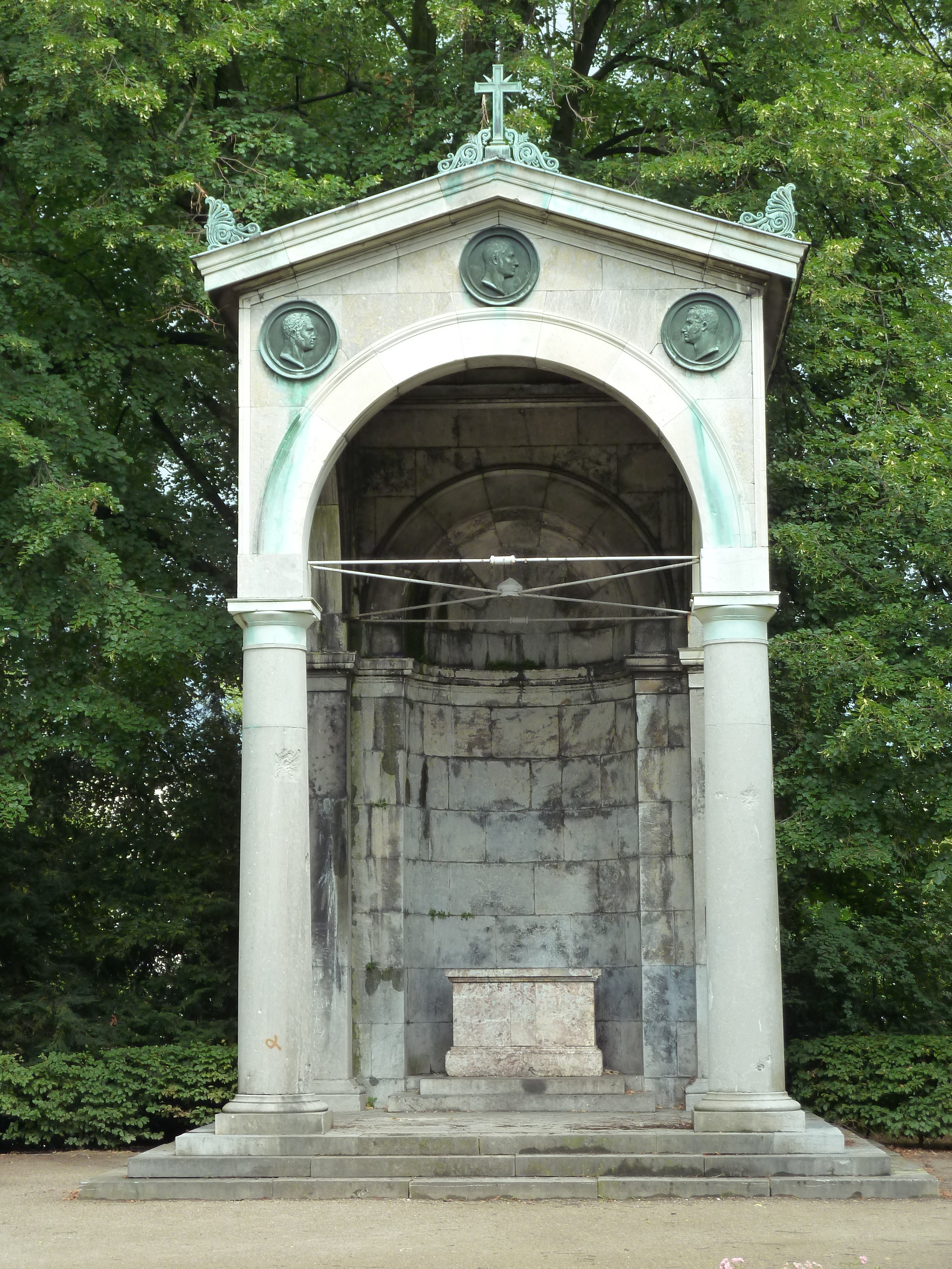 Kongressdenkmal im Farwickpark